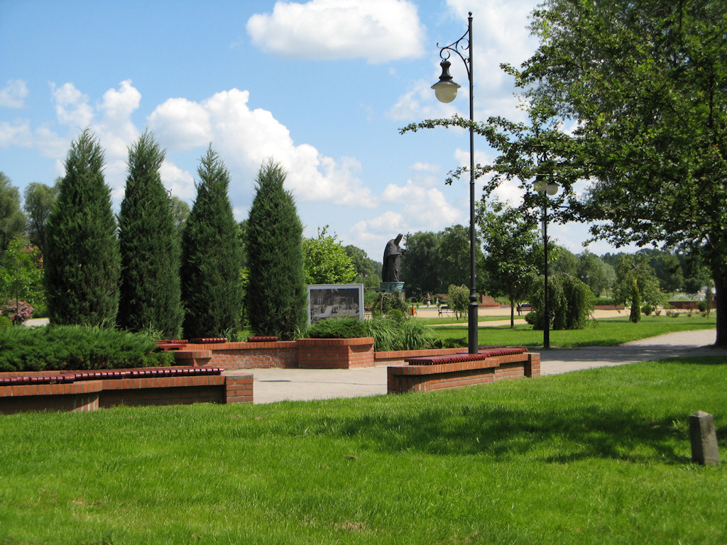 Plac im. Jana Pawła II w Ełku